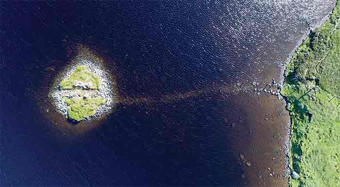 Dieses Inselchen im Loch Bhorgastail auf der Hebrideninsel Lewis wurde schon vor rund 5.500 Jahren aus Steinblöcken und Holzbalken erbaut. © F. Sturt/ Antiquity, CC-by-sa 4.0